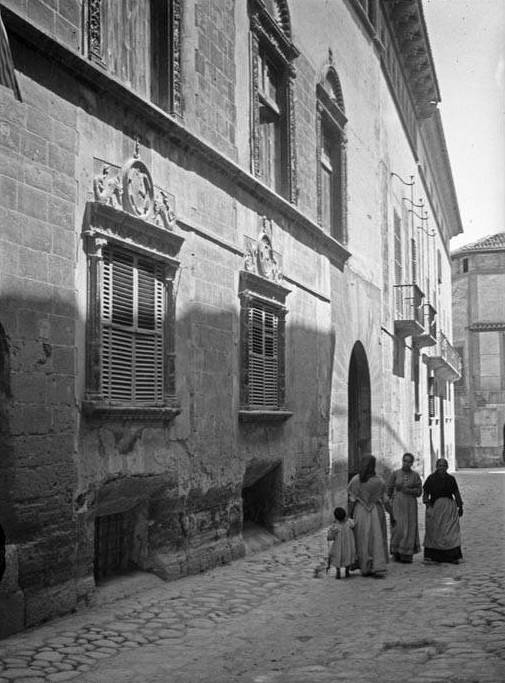 Imatge